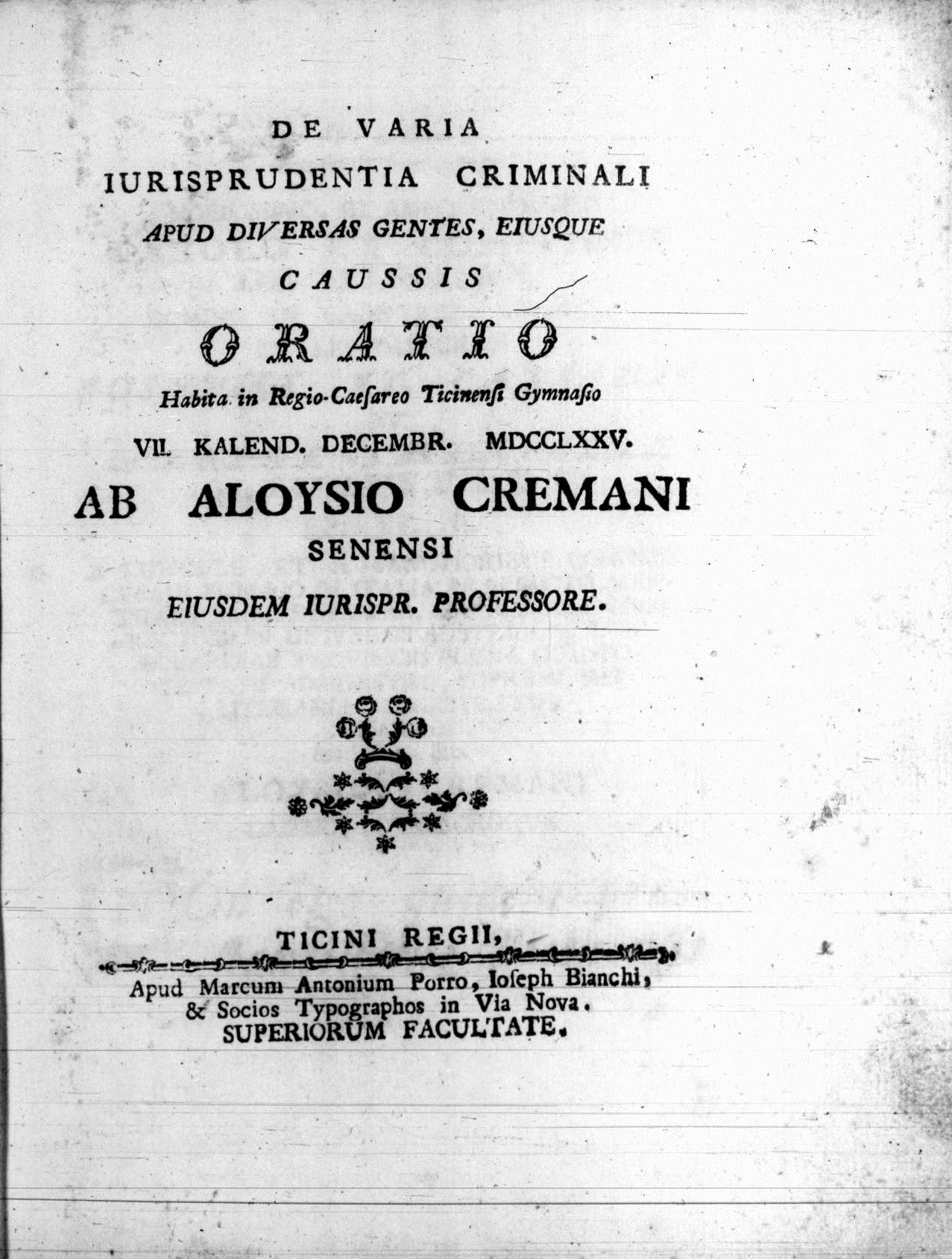 Frontespizio